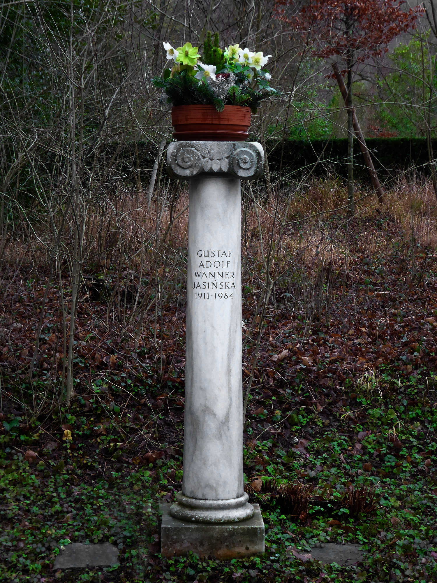 Gustaf Adolf Wanner-Jasinska (1911–1984) Dr.phil., Historiker, Journalist, Autor, Basler-Lokalhistoriker, Chronist, Konsul Dänemarks und Schwedens in Basel, Grab auf dem Friedhof Hörnli, Riehen, Basel-Stadt